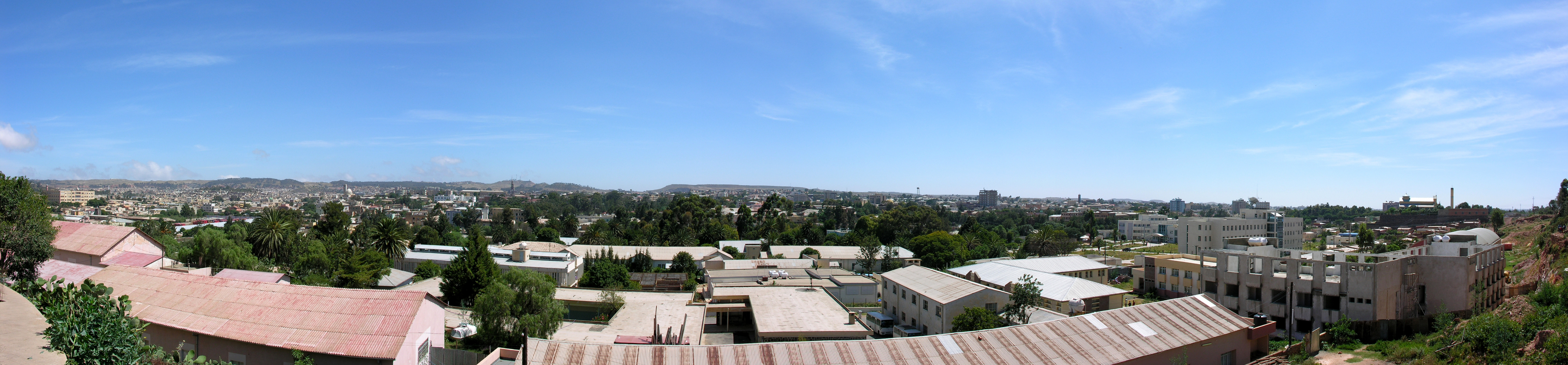 Asmara, capital of Eritrea